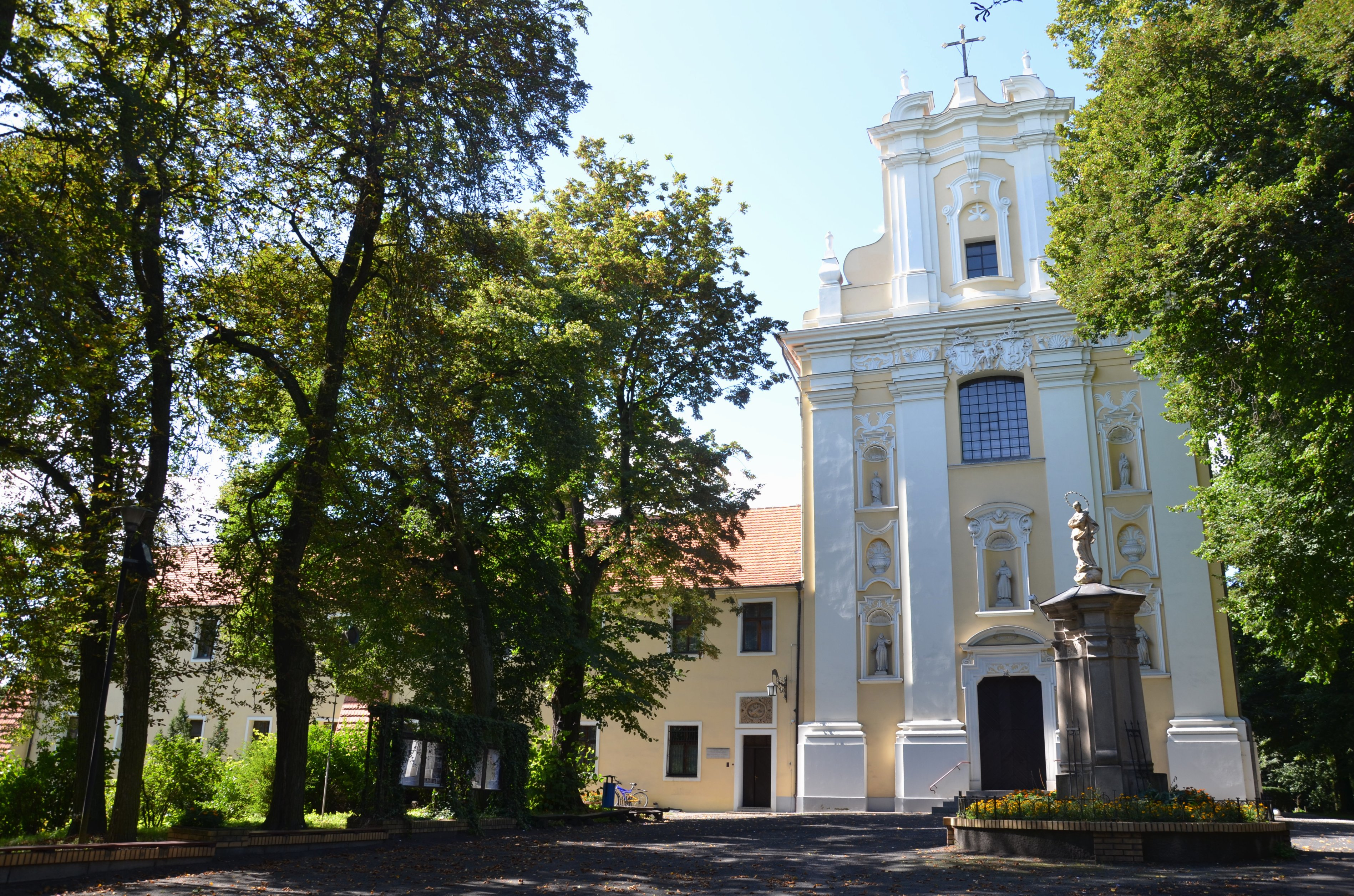 Woźniki, zespół klasztorny reformatów, 1 poł. XVIII, XX